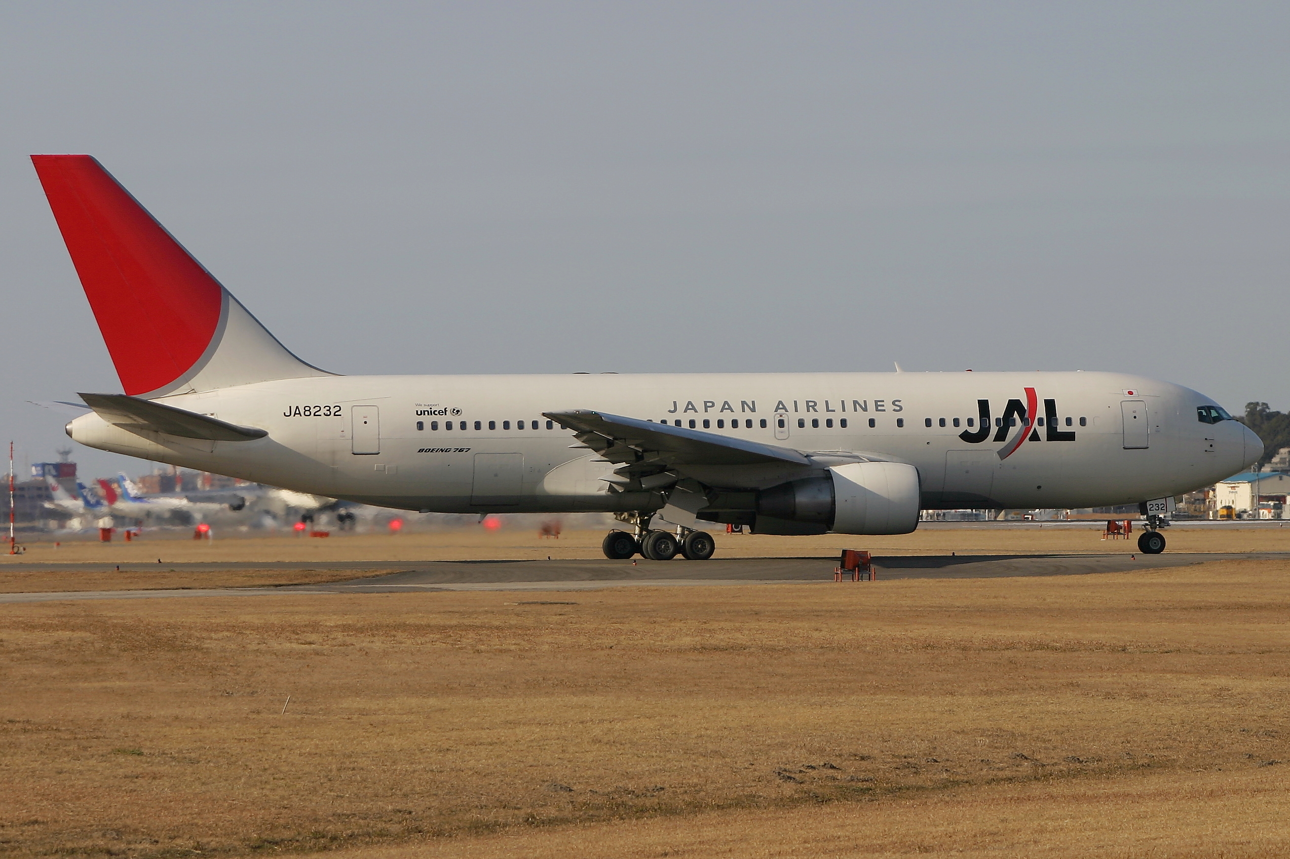 日本航空 ボーイング 767-200 福岡空港